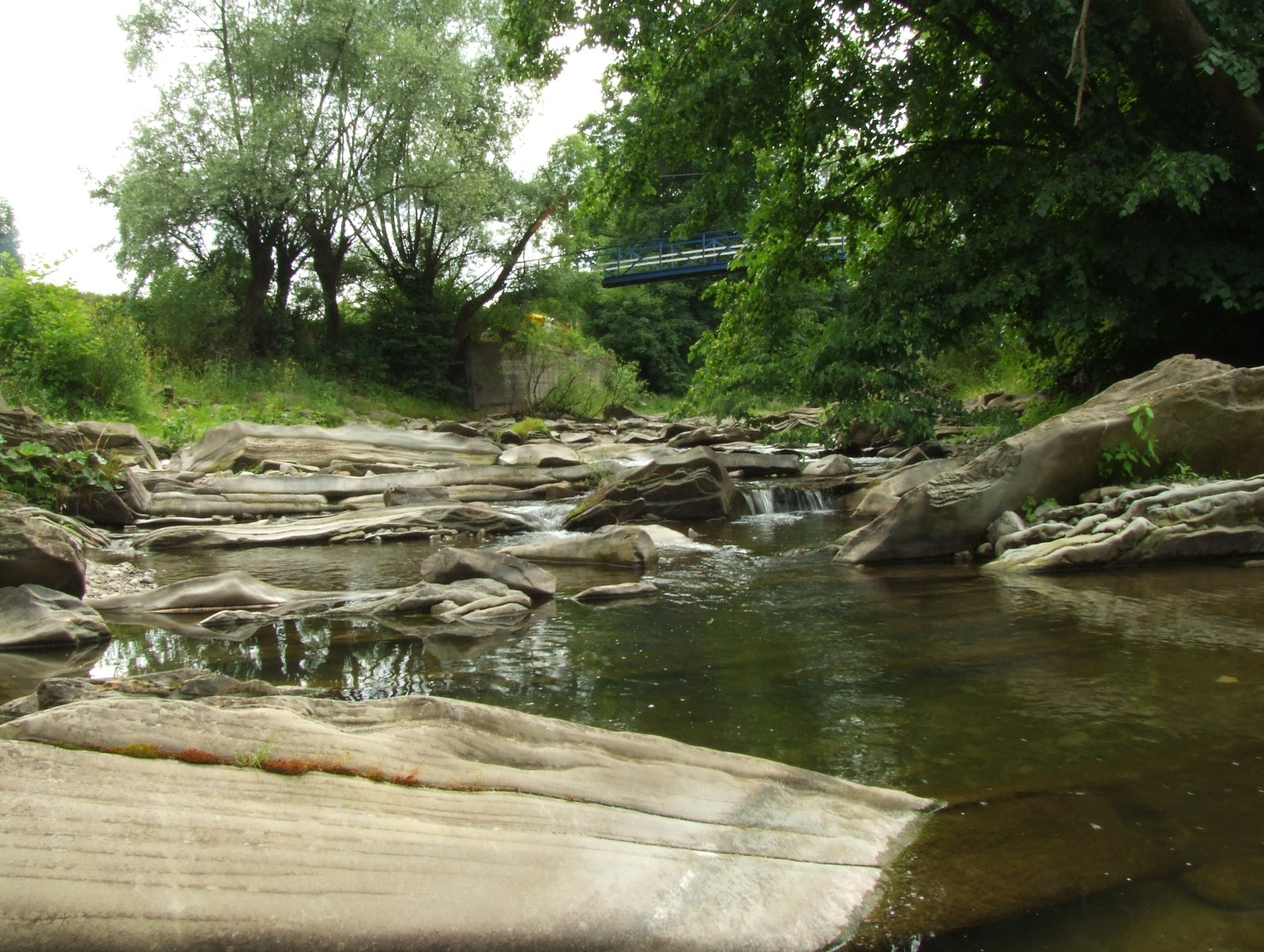 Progi skalne na rzece Słopniczanka (tzw. "Tabacorz')w pobliżu jej ujścia do Łososiny w Tymbarku